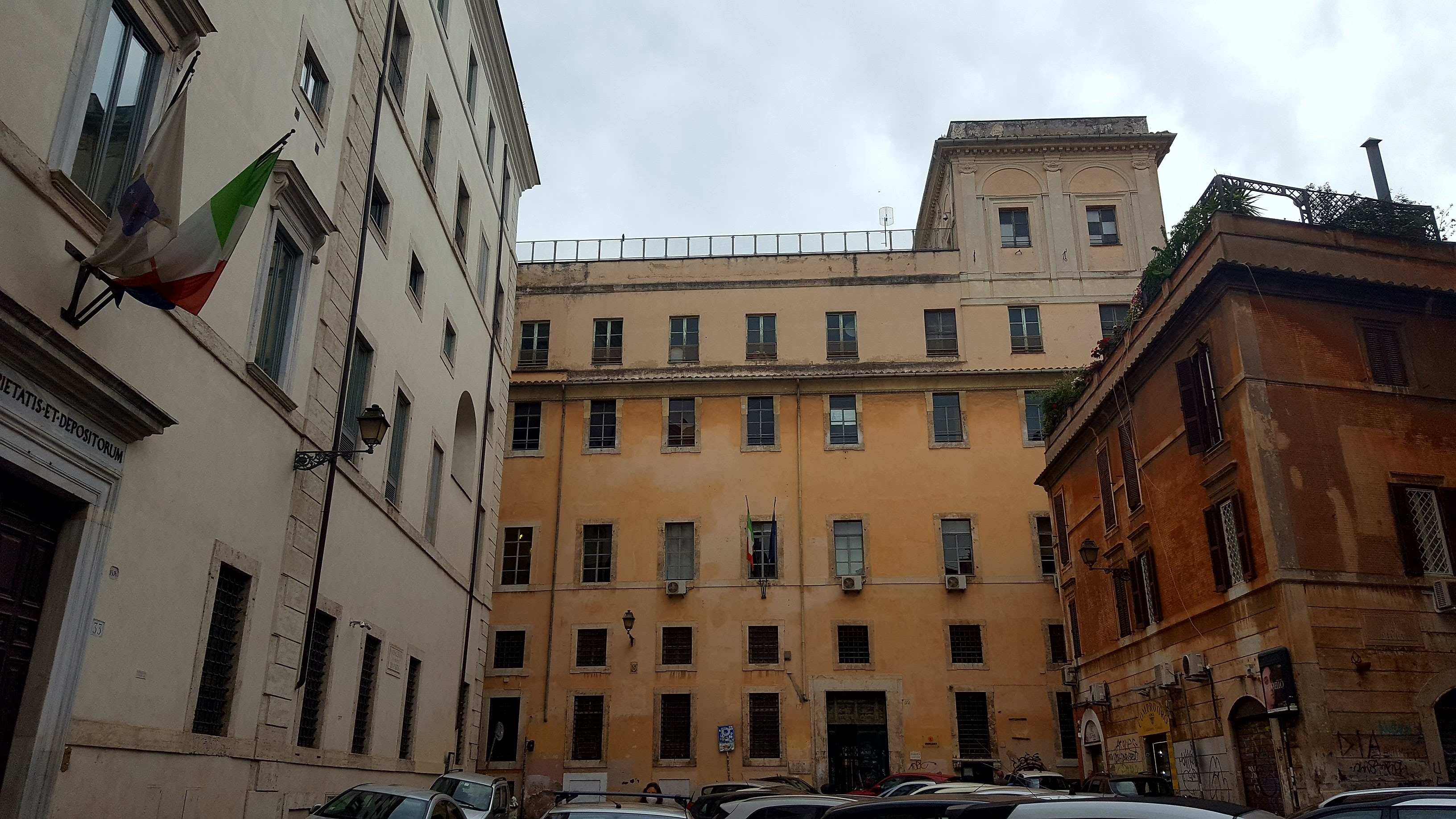 Casa Grande Barberini - sede del Liceo VittoriaColonna